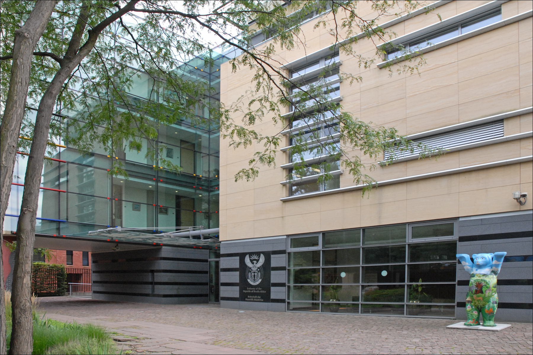 L'Ambassade d'Afrique du Sud comprend plusieurs bâtiments perpendiculaires entre eux. La façade principale est recouverte de plaques de grès jaune, en provenance du pays qu'elle représente, sur un socle de granite gris. Les bâtiments, terminés en 2003 ont été conçus par l'agence MMA Architects de Johannesburg. site de MMA